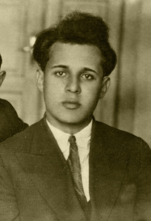 ברוך אוליצקי, משורר יידי שנרצח בשואה